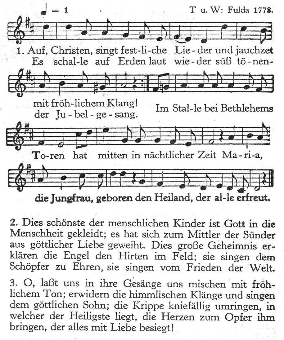 Auf, Christen, singt festliche Lieder, Melodie- und Textfassung des Paderborner Gebet- und Gesangbuchs Sursum corda (Melodie Fulda 1778; Text Fulda 1778 / Ehrenbreitstein 1823)